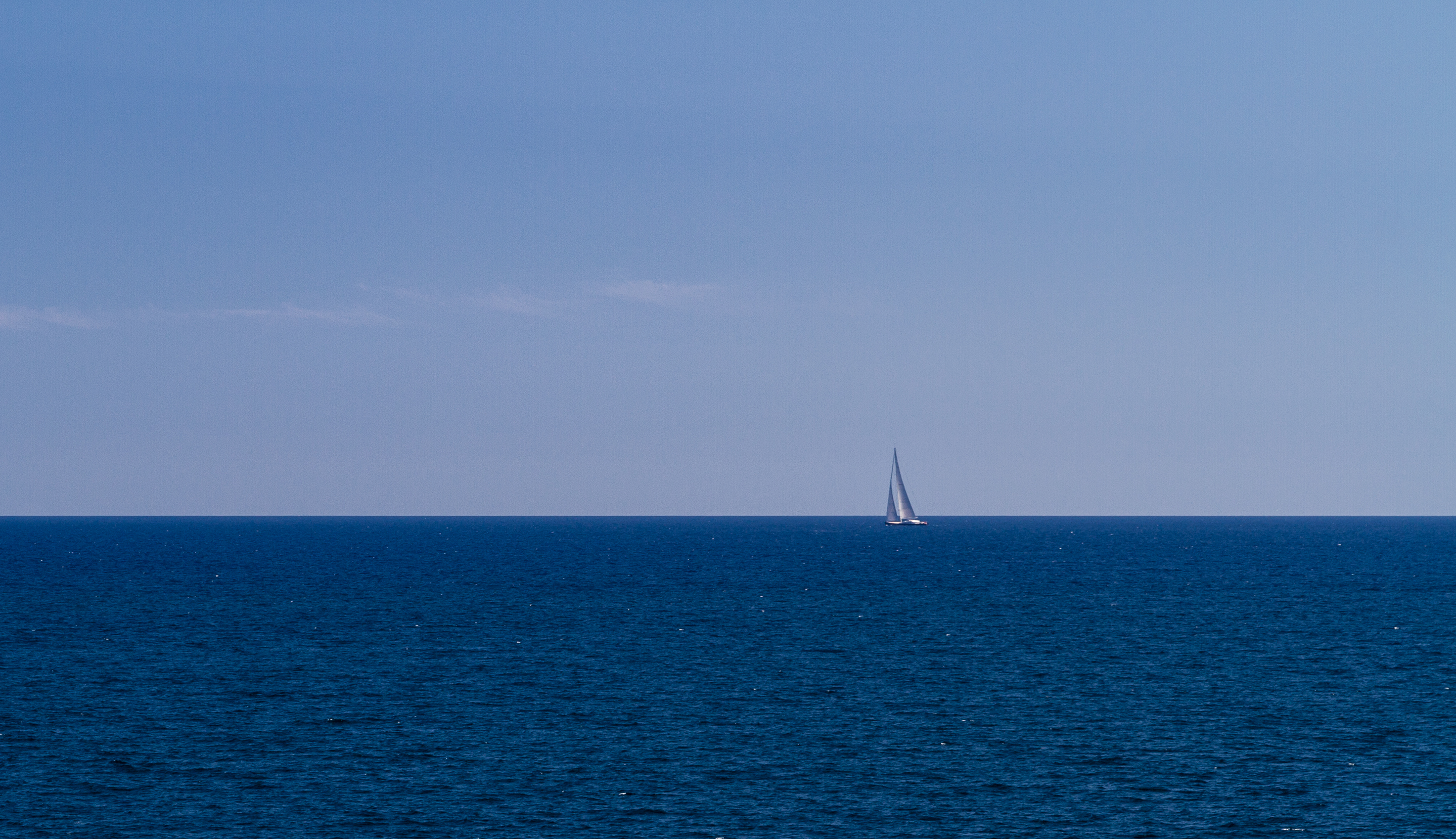 Sailboat at Palma de Mallorca.